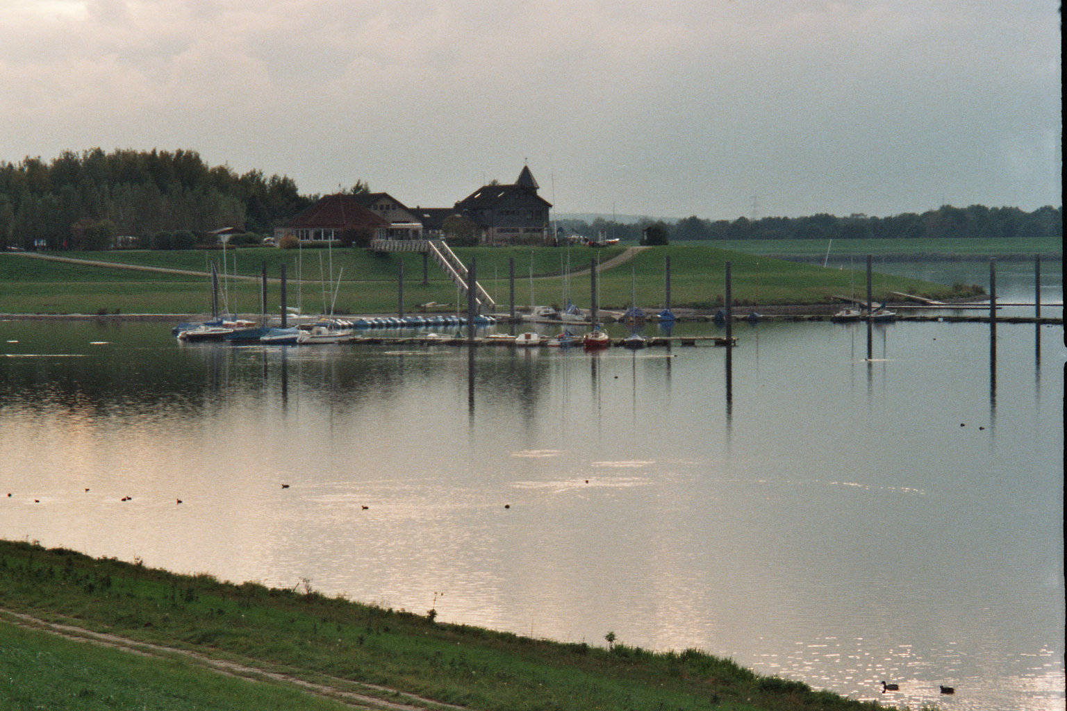 Bootshafen am Alfsee